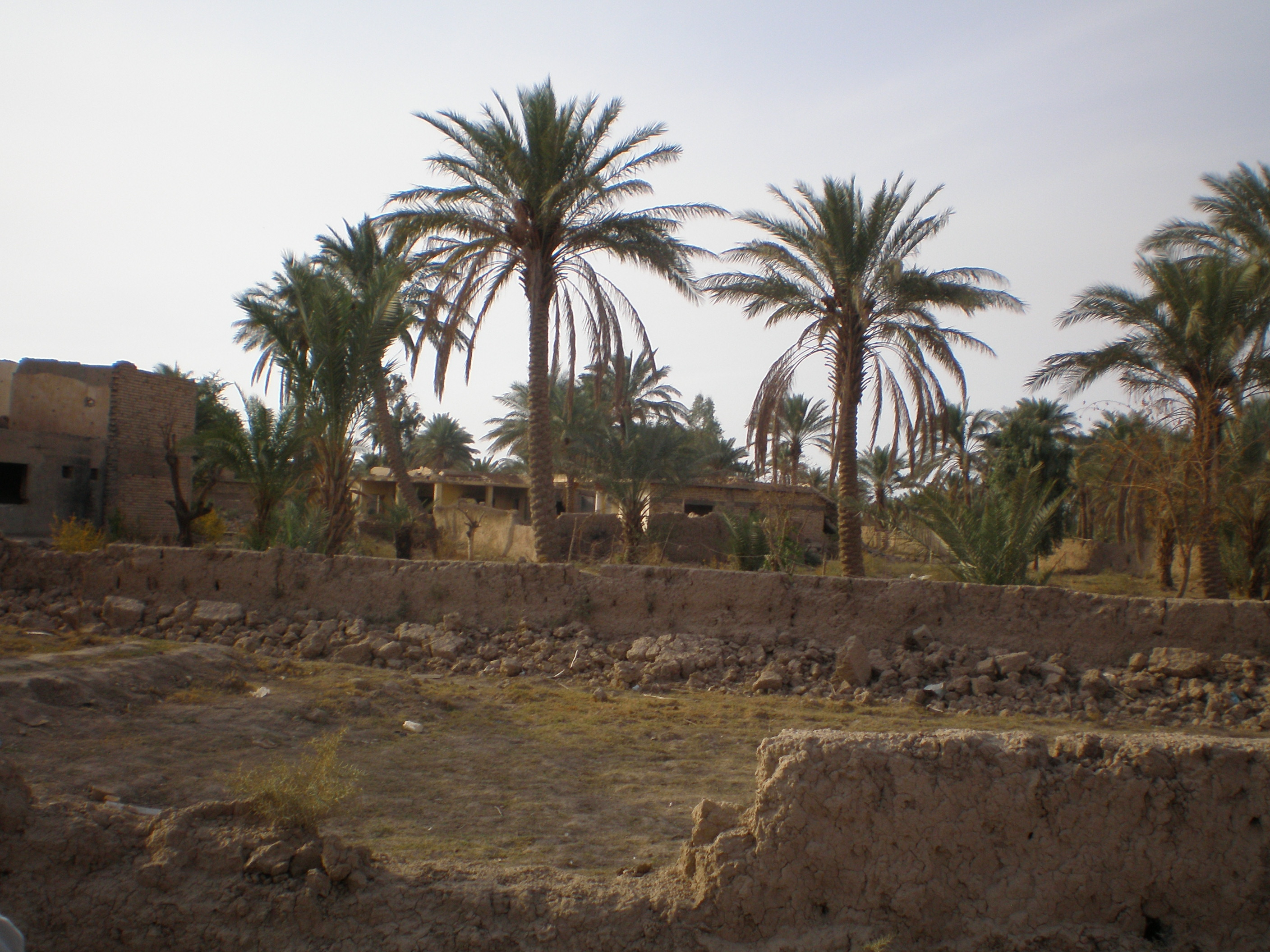 Al-Mujadad, Diyala. Iraq 2009. Photo: AusAID